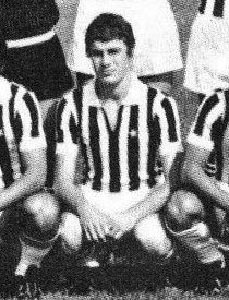 Il calciatore italiano Luigi Danova alla Juventus nella stagione 1970-71.